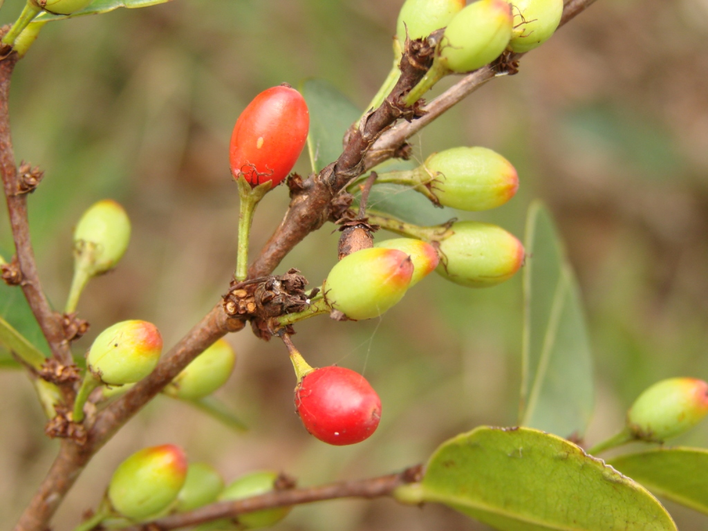 Erythroxylum deciduum - ERYTHROXYLACEAE Parque Olhos d' água - Brasília - Distrito Federal - Brasil.